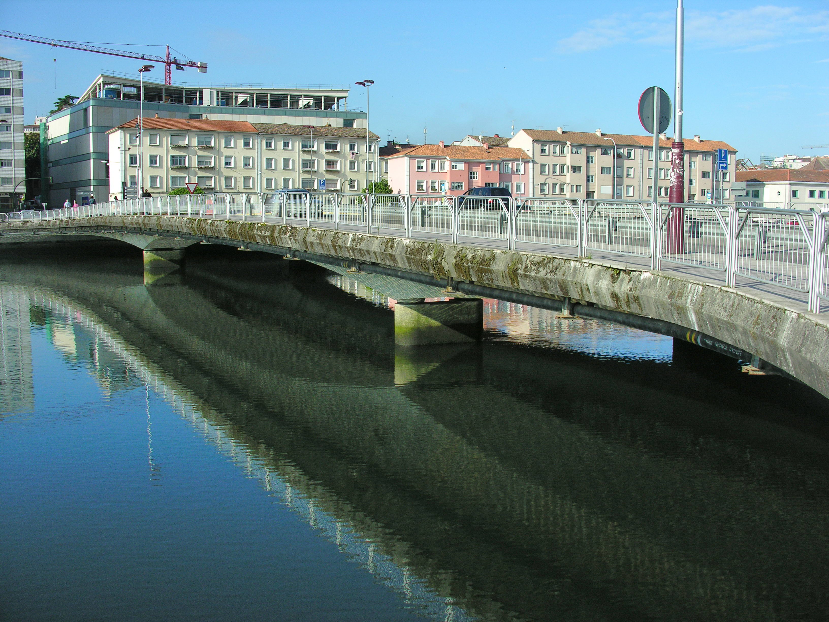 Ponte en Pontevedra, Galicia Publish by= Luis Miguel Bugallo Sánchez.